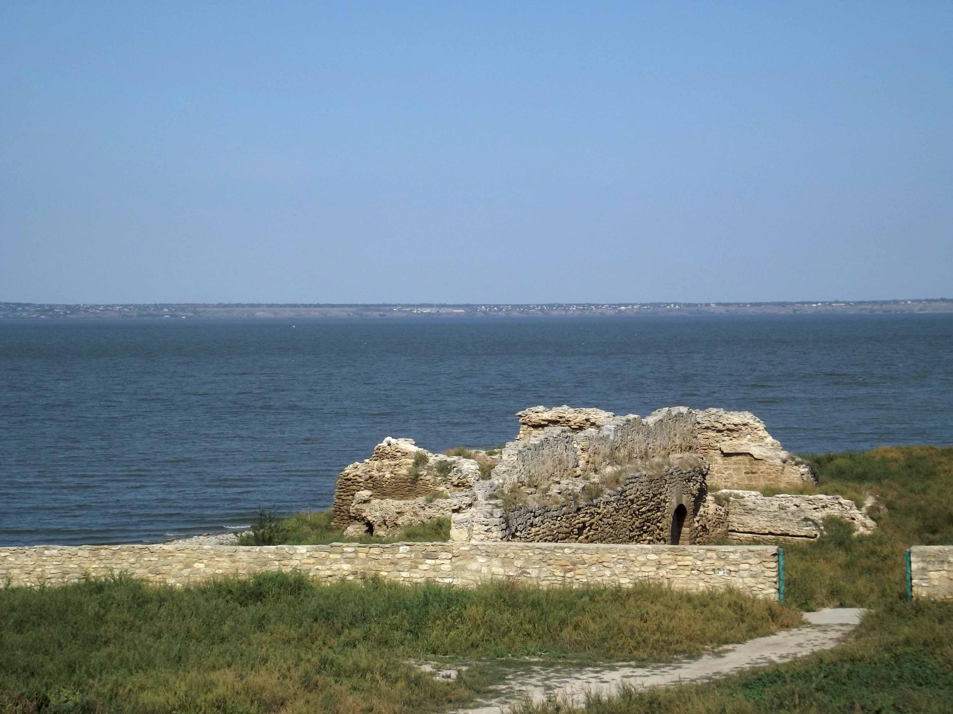 Совреиенное состояние Портового двора